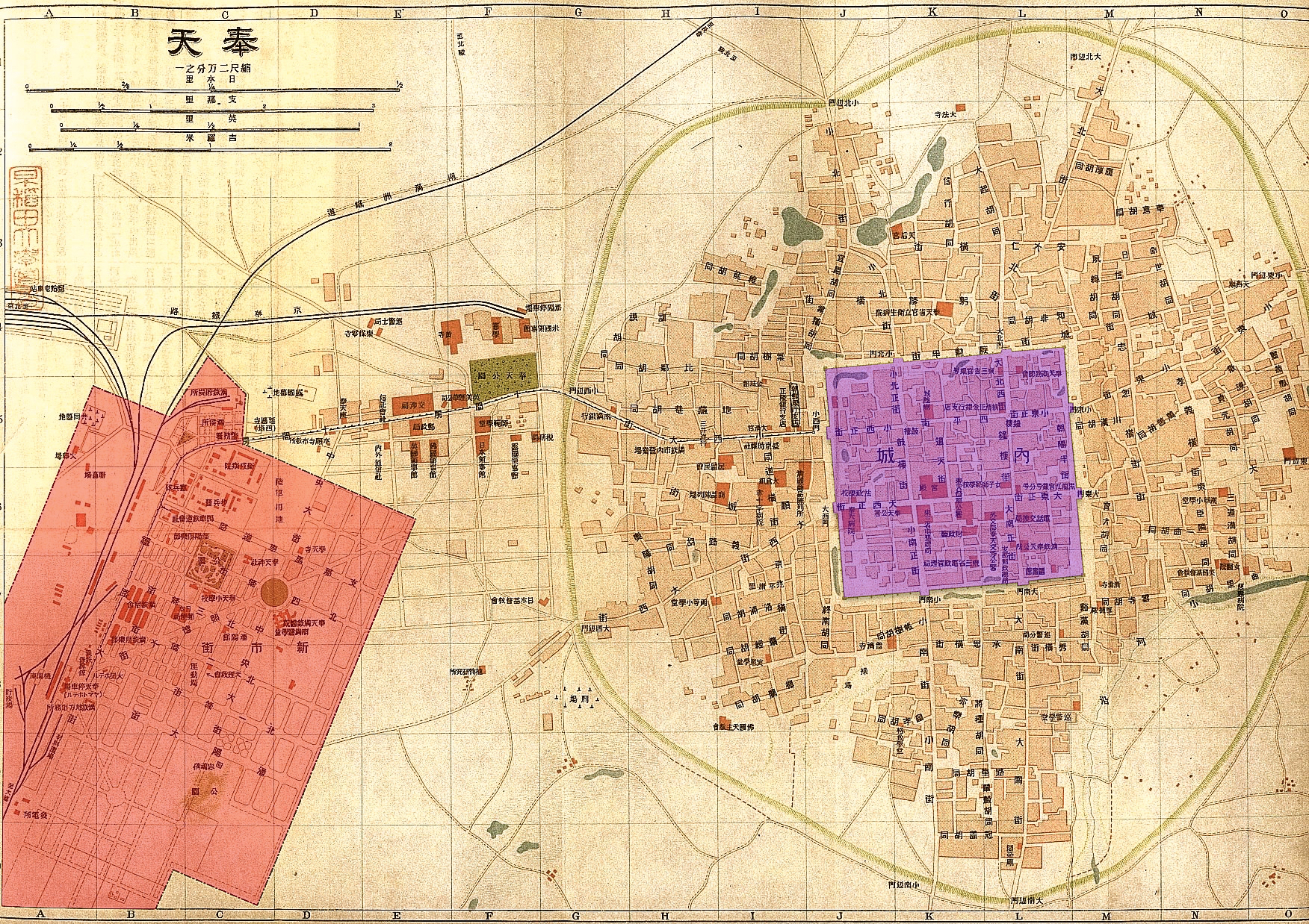 中文（中国大陆）: Map of Shenyang in 1919